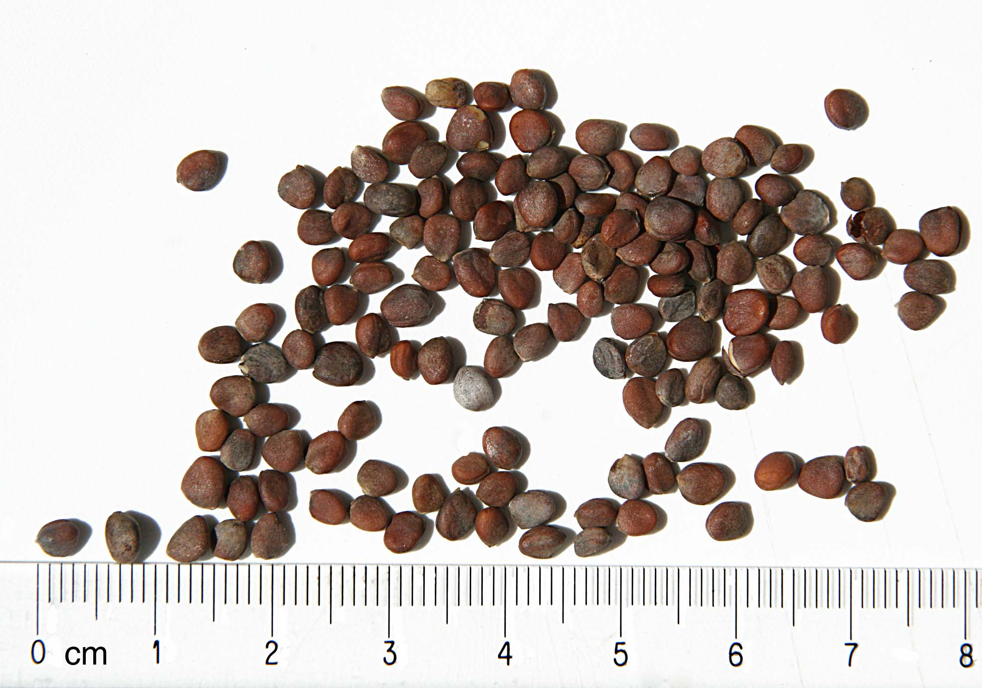 graines de daïkon long blanc avec échelle cm